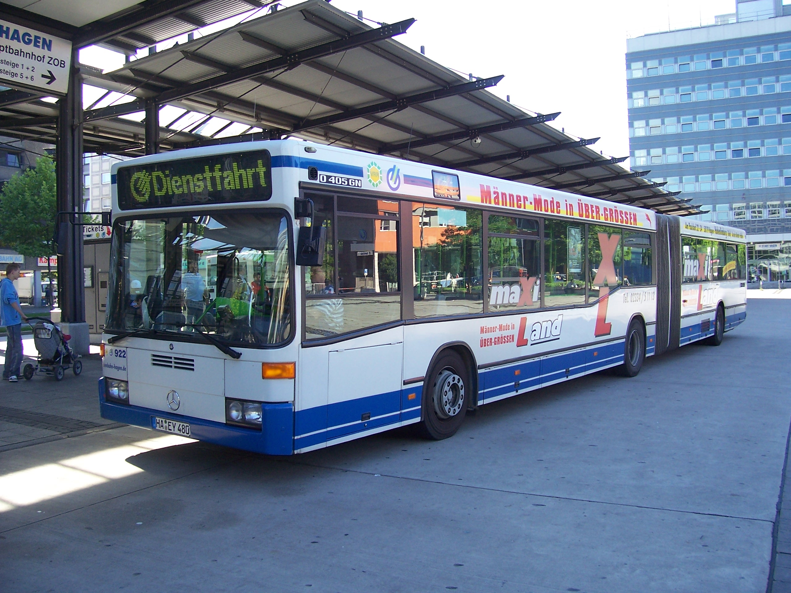 Mercedes-Benz O 405 GN Gelenkbus der Hagener Straßenbahn AG an der Haltestelle Hagen-Hauptbahnhof